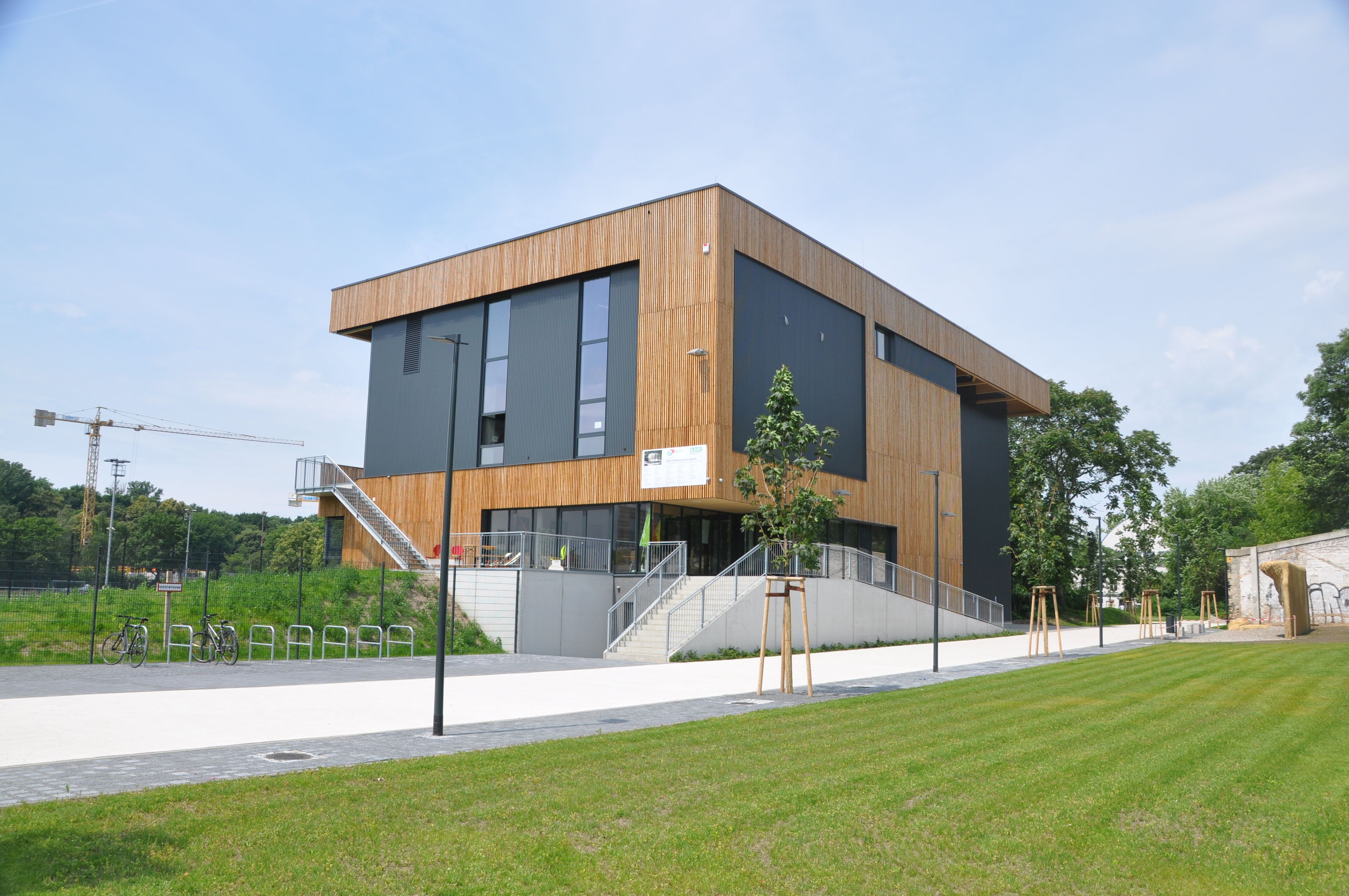 Kletterzentrum der DAV-Sektion Berlin in der Seydlitzstraße 1 H, 10557 Berlin